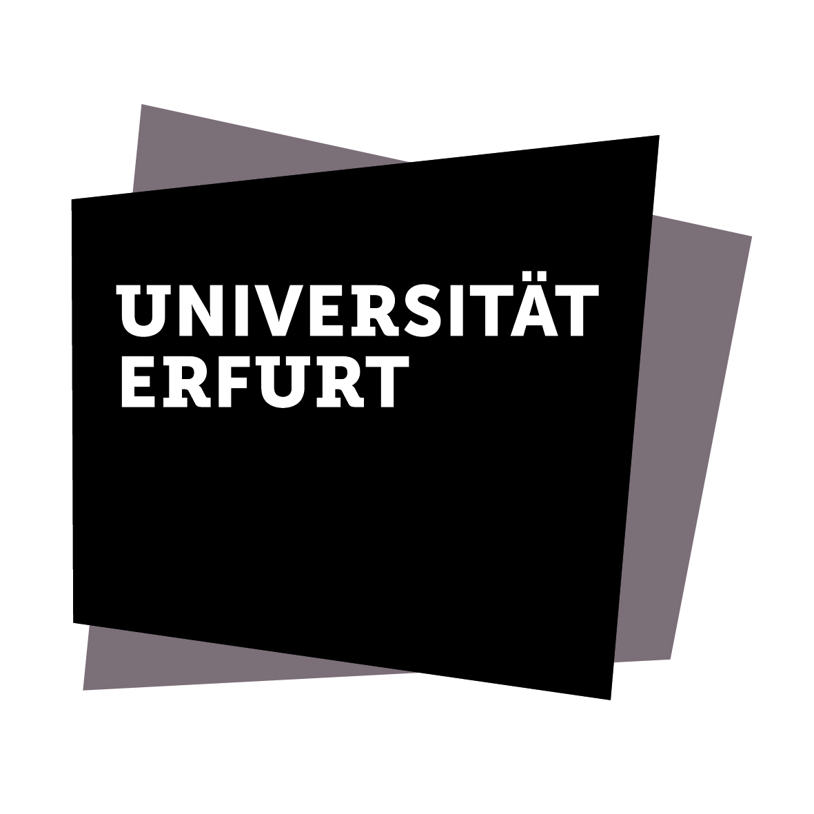 Die Universität Erfurt präsentiert sich im 25. Jahr ihres Bestehens in einem neuen Corporate Design. Es trägt dem neuen Markenkern Rechnung und ermöglicht der Universität einen zeitgemäßen, frischen und selbstbewussten Auftritt. Das neue Erscheinungsbild stellt dabei die Menschen in den Mittelpunkt, die auf dem Campus studieren, forschen und arbeiten – Impulsgeber, Vorbilder, „Macher“…